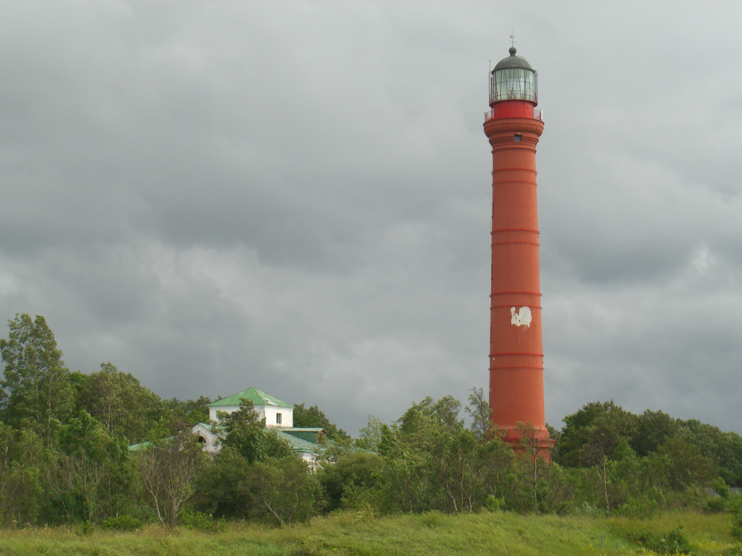 Pakri tuletorn